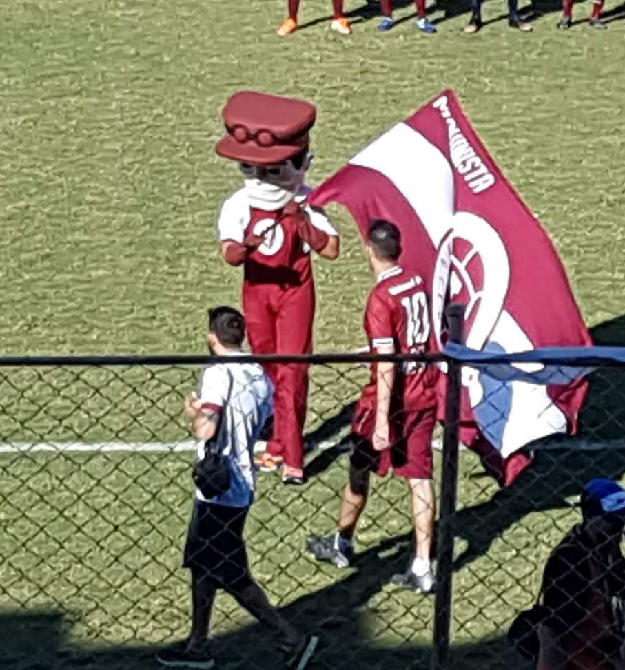 O Maquinista, mascote da Desportiva Ferroviária, em registro de 2019.